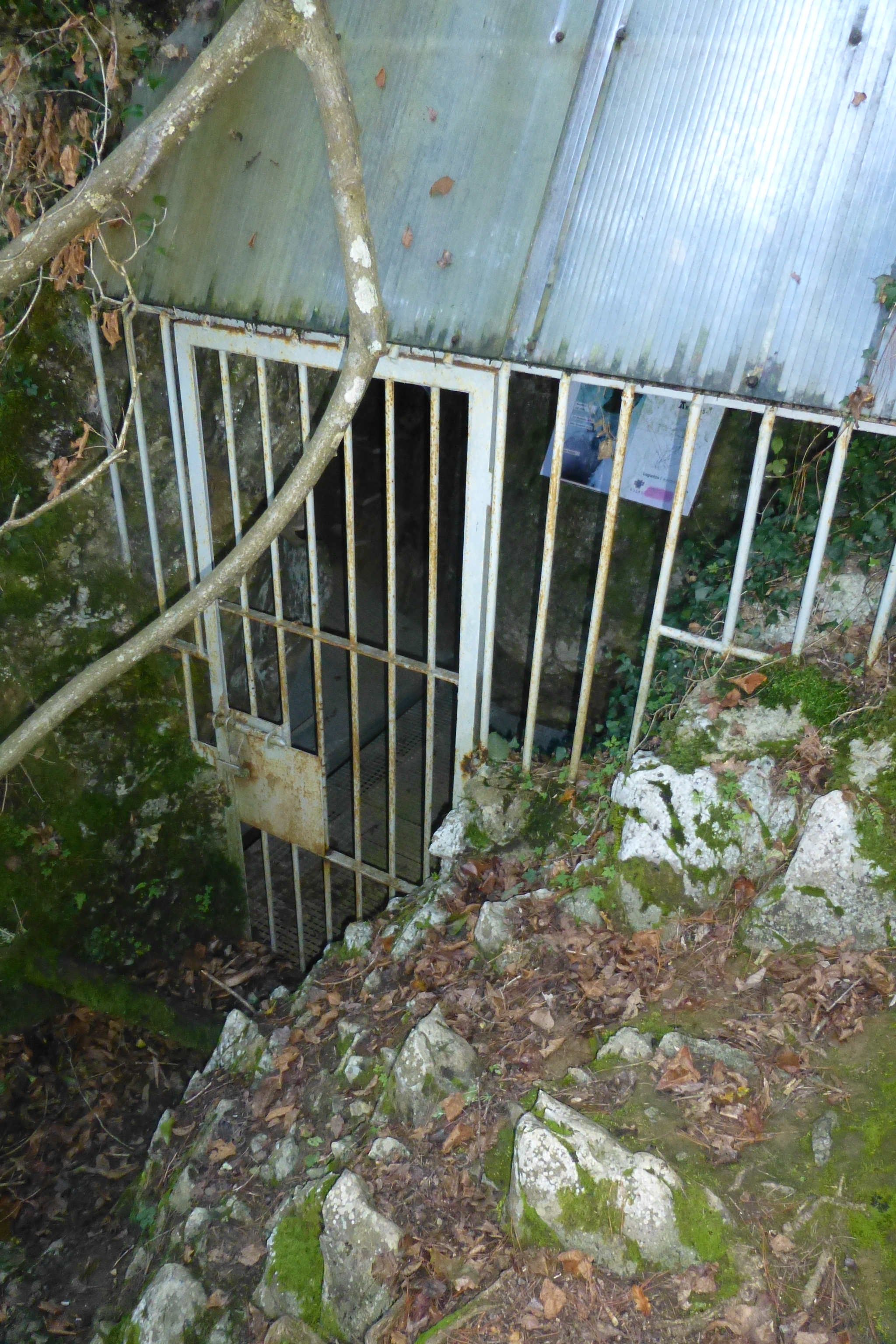 Entrada de la cueva de Ekain en Deba (Gipuzkoa) País Vasco (España).